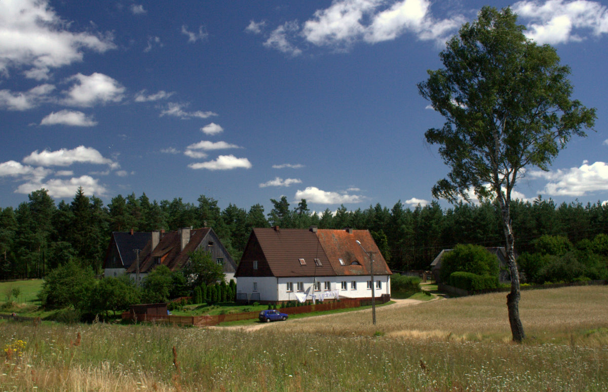 Czarna Dąbrowa - zabudowa